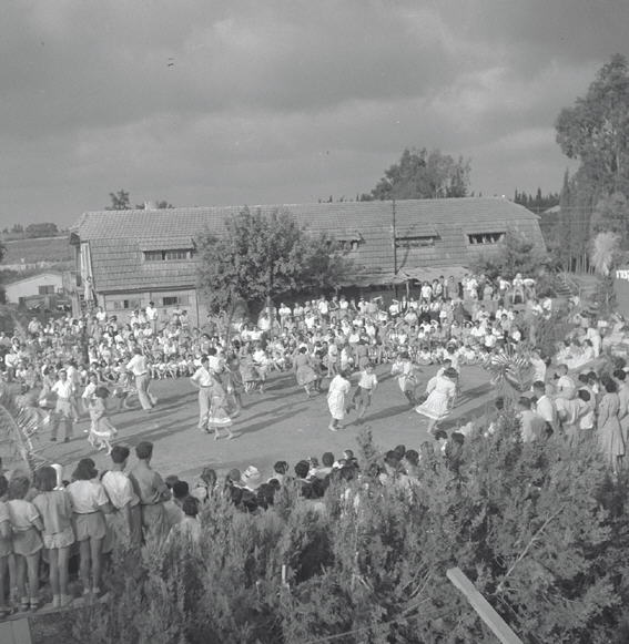 גן שמואל - חגיגת ביכורים